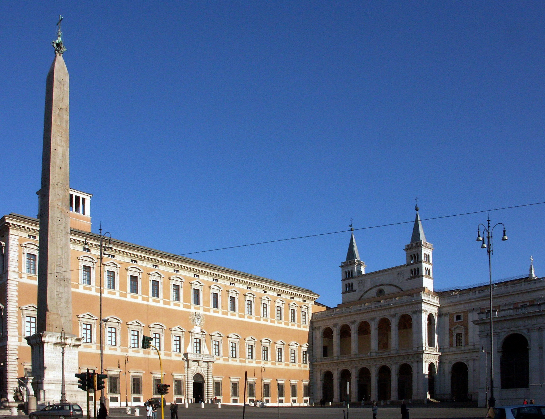 San Giovanni in Laterano - Seitenansicht